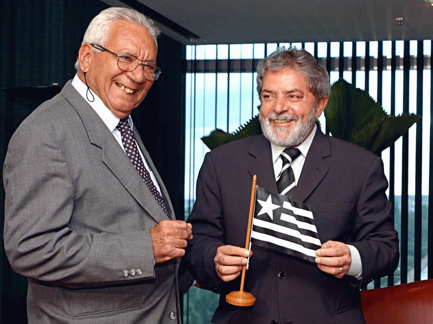 Brasília - O presidente Luiz Inácio Lula da Silva exibe bandeira que ganhou do ex-jogador do Botafogo, Nilton Santos.